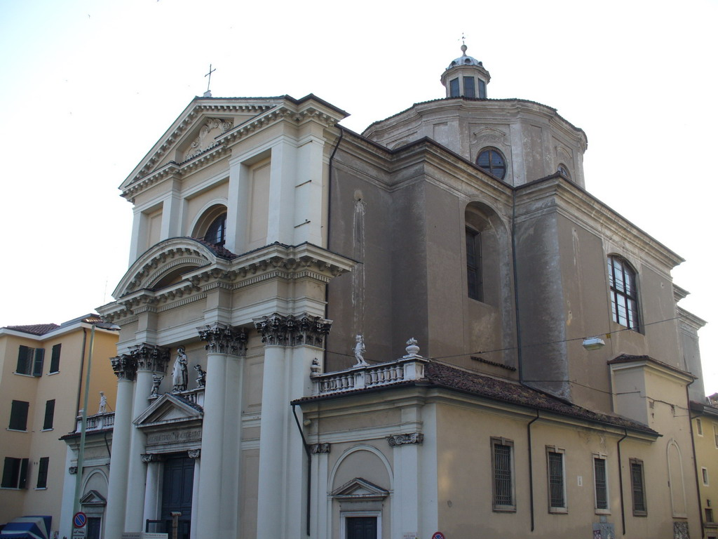 Brescia - Chiesa di San Lorenzo.